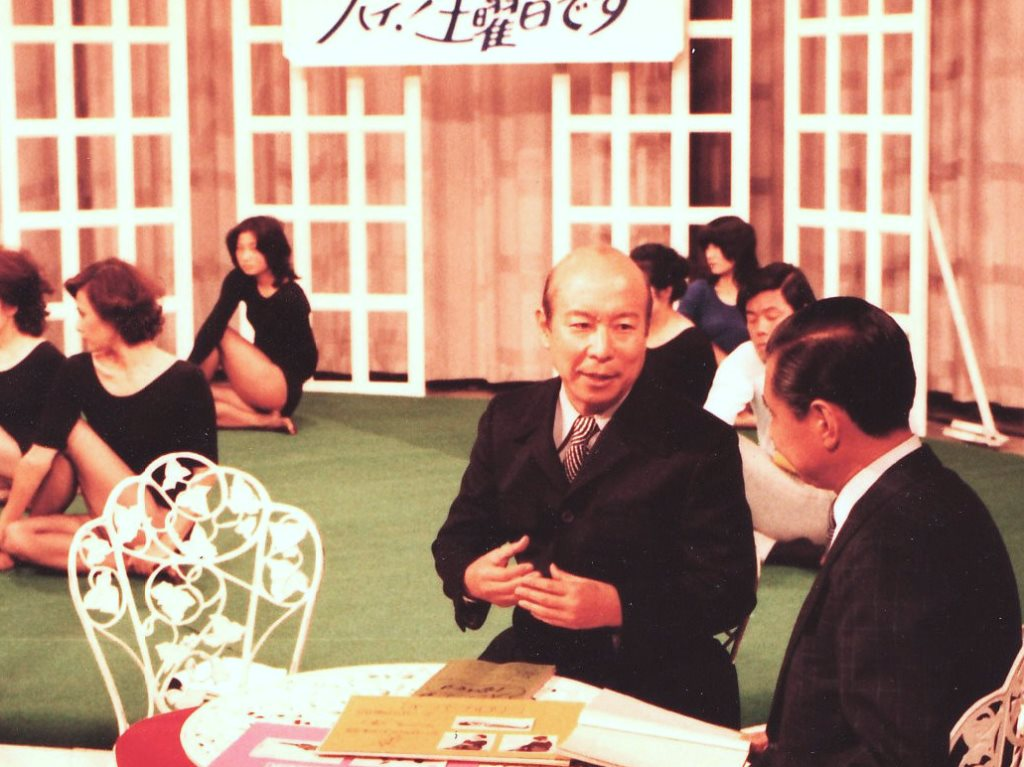 1979年〈昭和54年〉、テレビ番組「ハイ!土曜日です」（関西テレビ・フジテレビ系列）でヨガ健康法を定期的に紹介、全国にヨガブームが起こる。